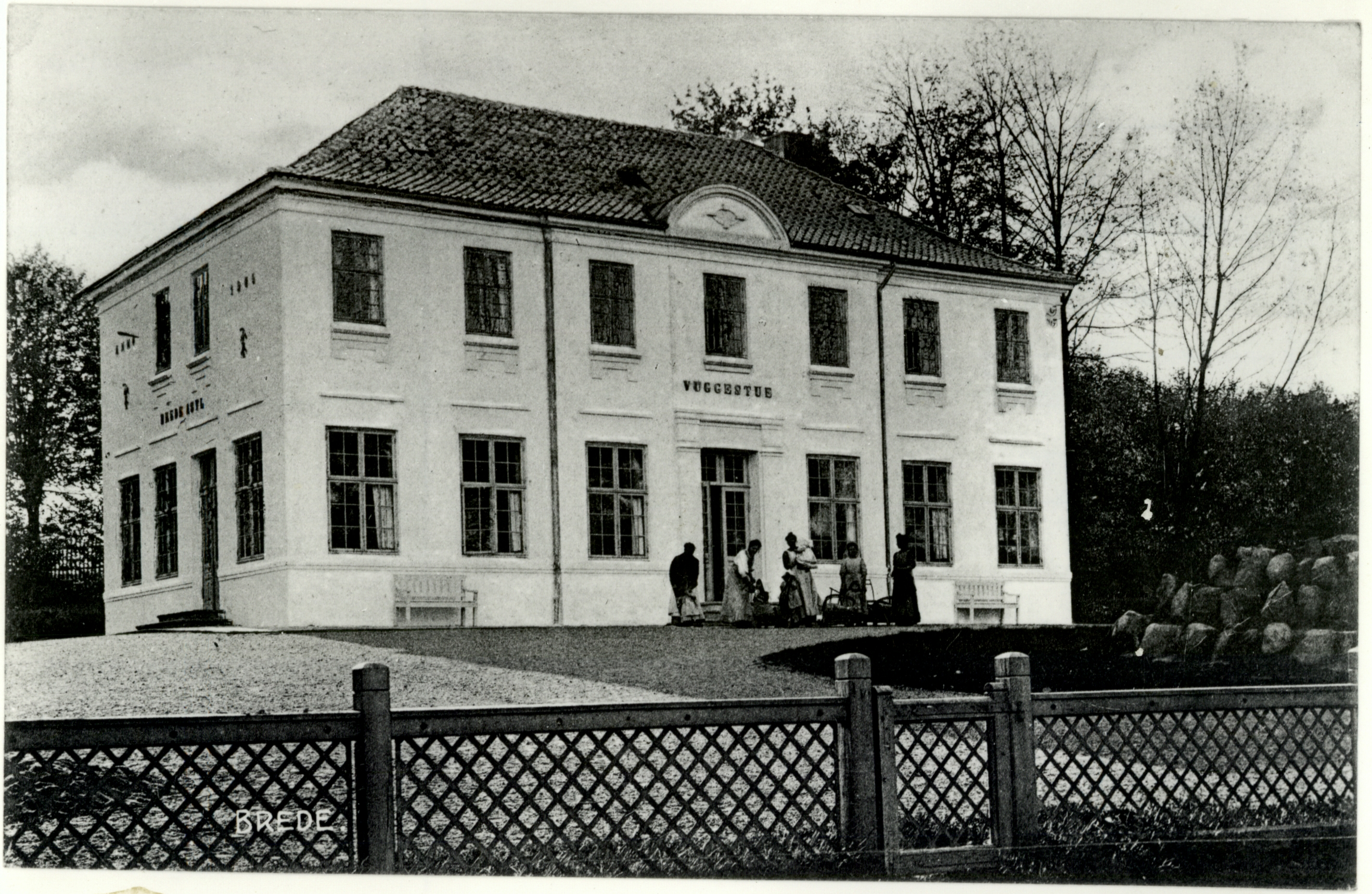 Udklip af kartotekskort med billede af Asylet i Brede fra postkort 1910.